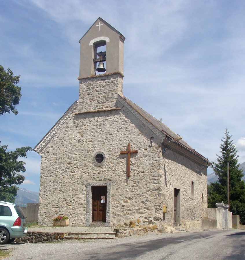 Chapelle à Forest-Saint-Julien (Hautes-Alpes). Cette chapelle est sur la grand-route au village de Forest ; l'église paroissiale est à Manse.